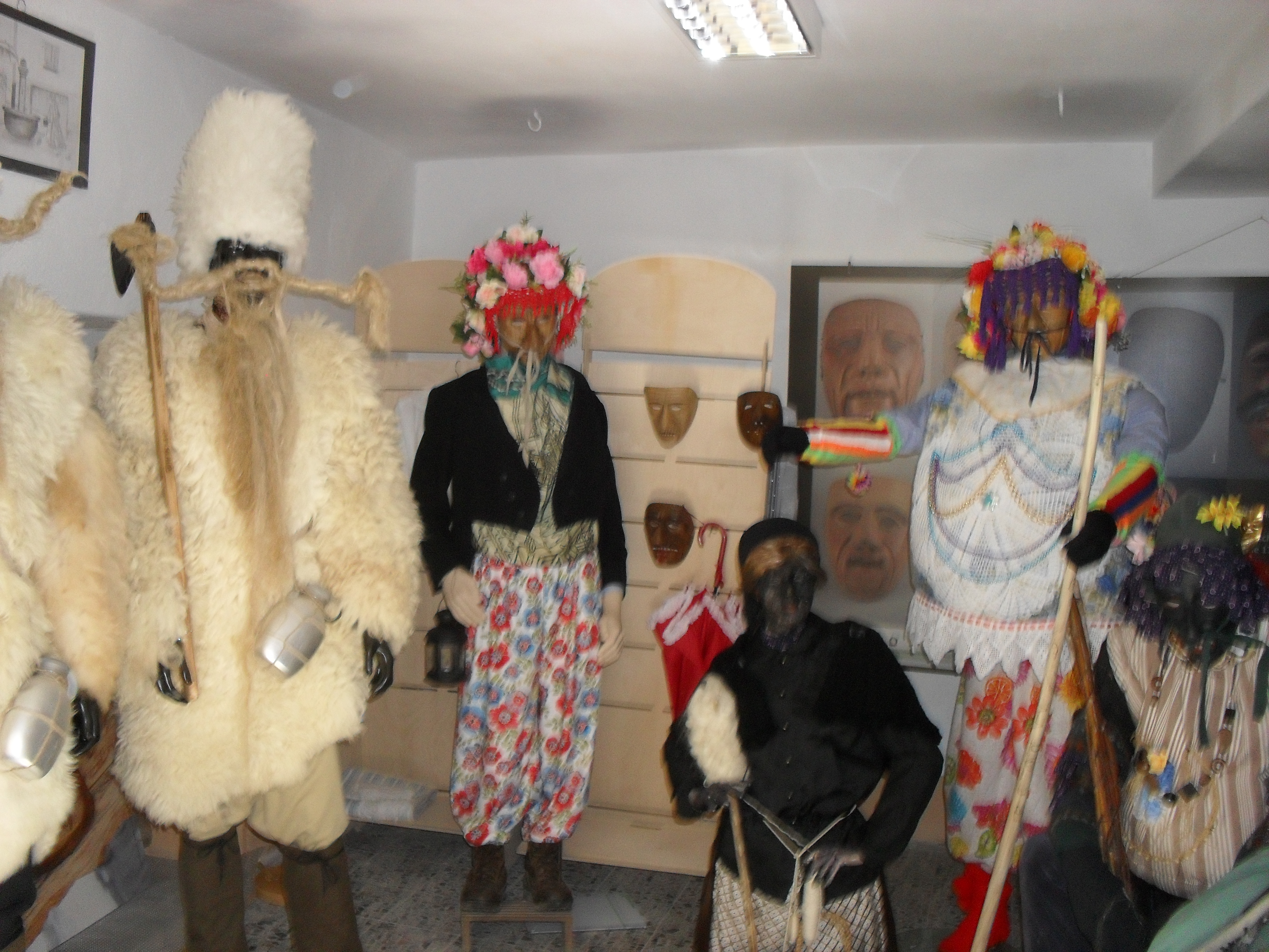 Maschere e costumi del carnevale